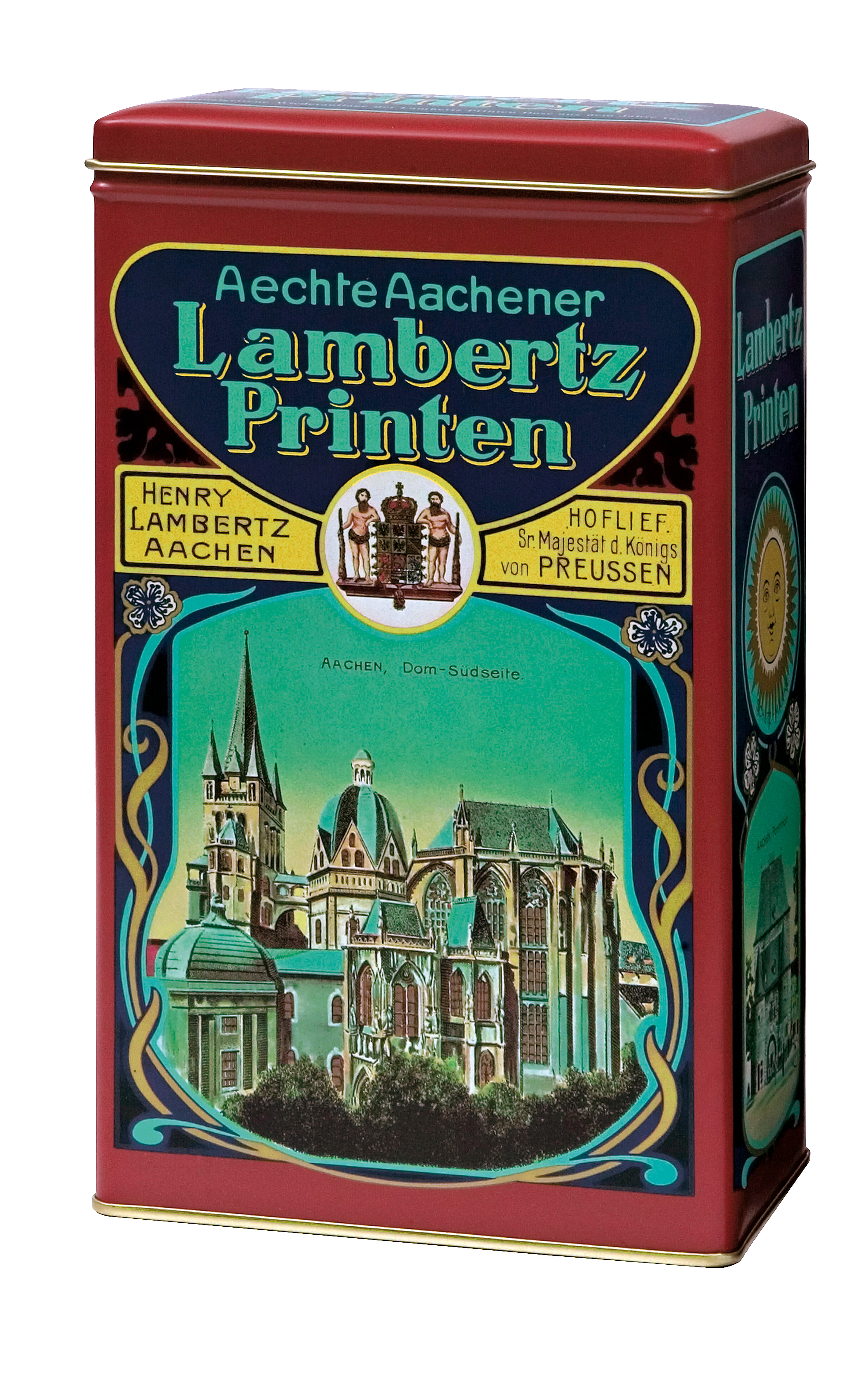 Historische Printendose "Aechte Aachener Lambertz Printen", die bereits 1890 im Lambertz-Sortiment war.